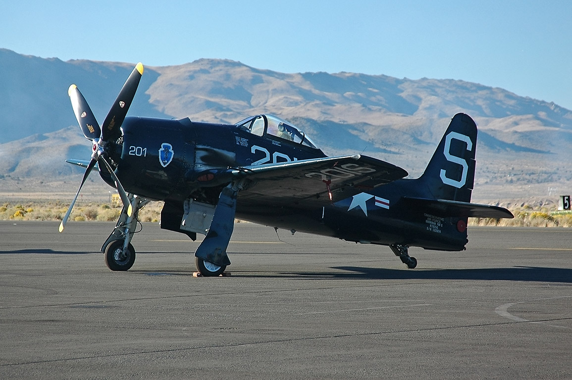 Grumman F8F-2 Bearcat in Reno/Nevada